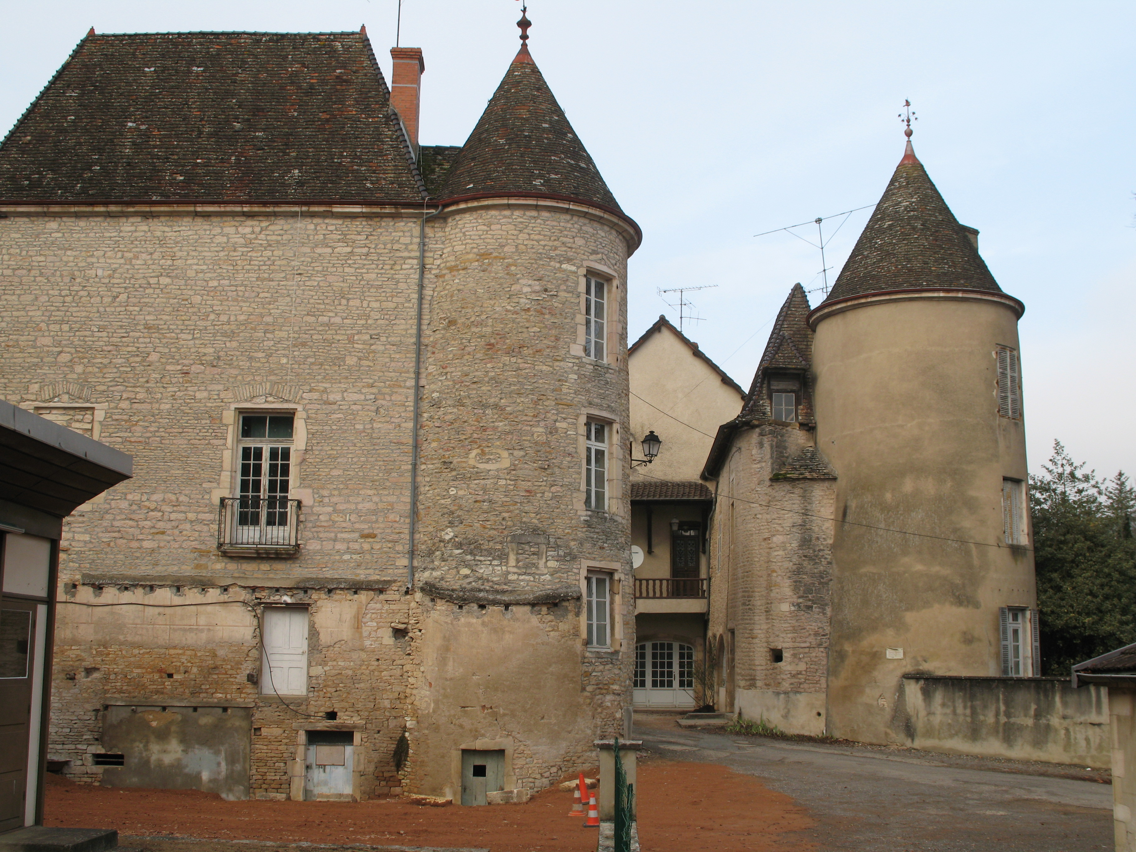 château de Lugny (Saône-et-Loire)